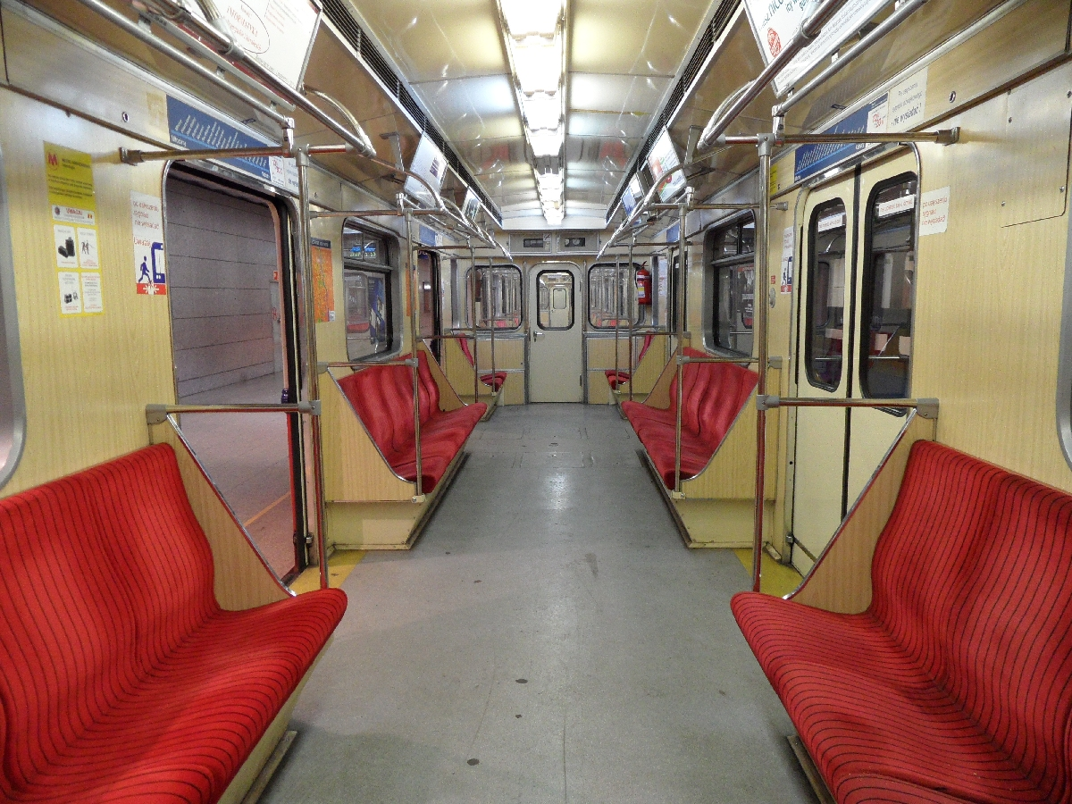 Metro Warszawskie - W pustym rosyjskim wagonie / In einem leeren russischen U-Bahnwagen